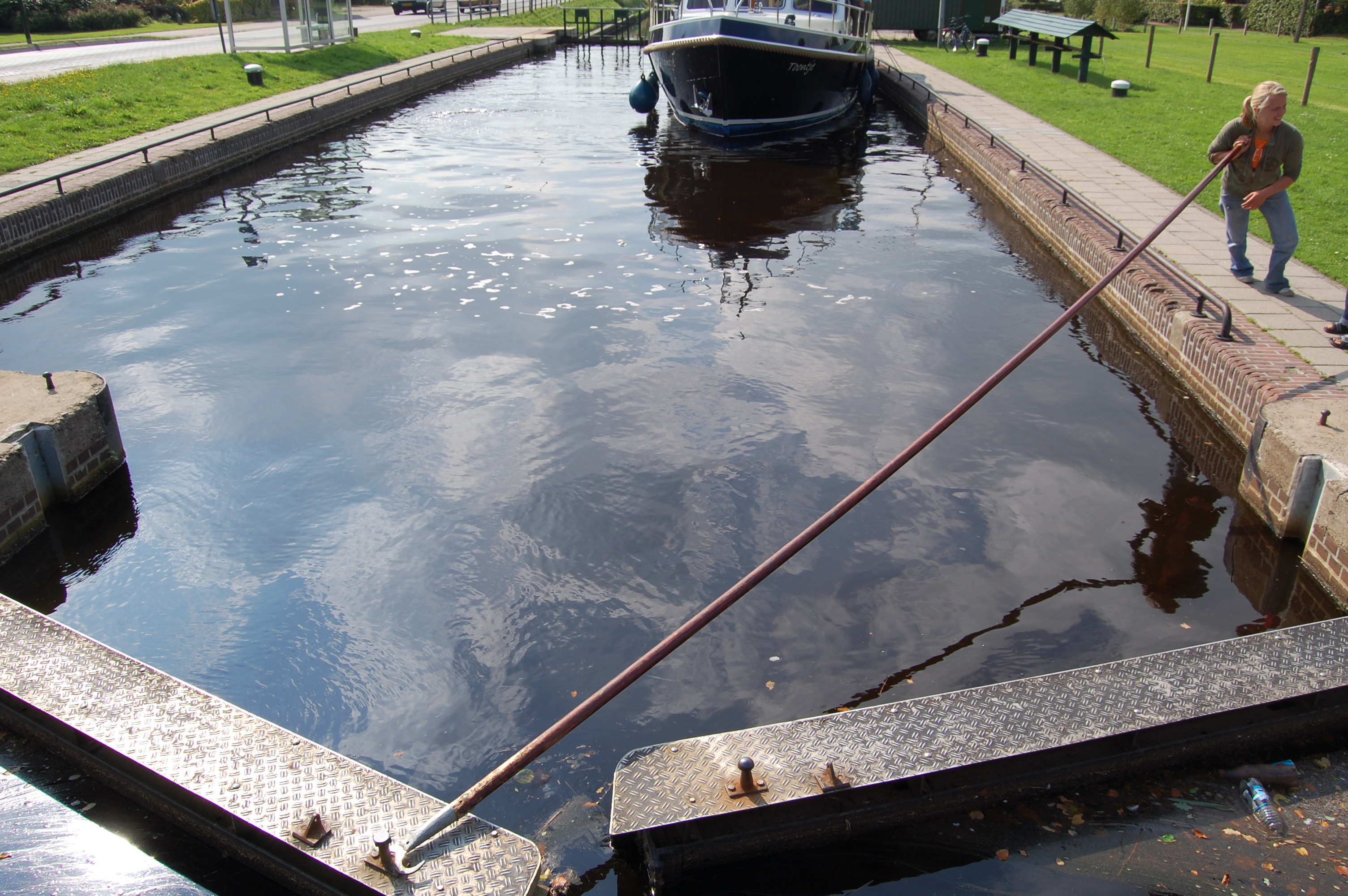 Het openen van de sluisdeuren in het Nanningaverlaat te Oosterwolde.